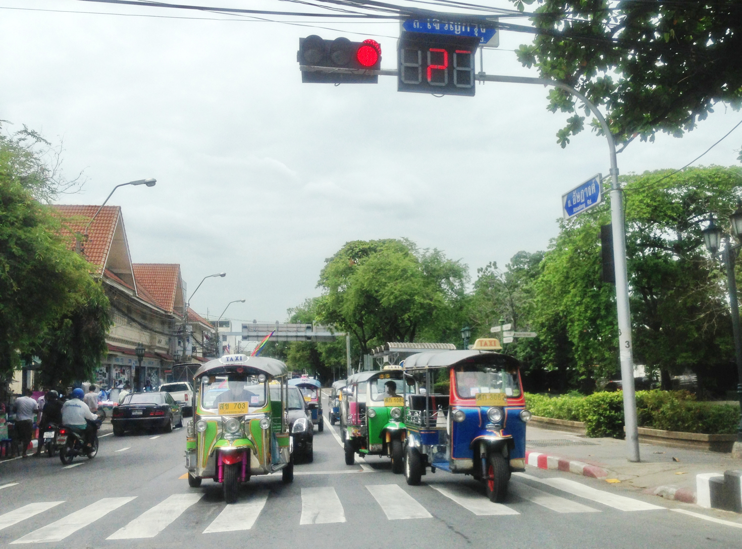 Atsadang rd,wang Burapha Phirom, Phra nakhon, Bangkok